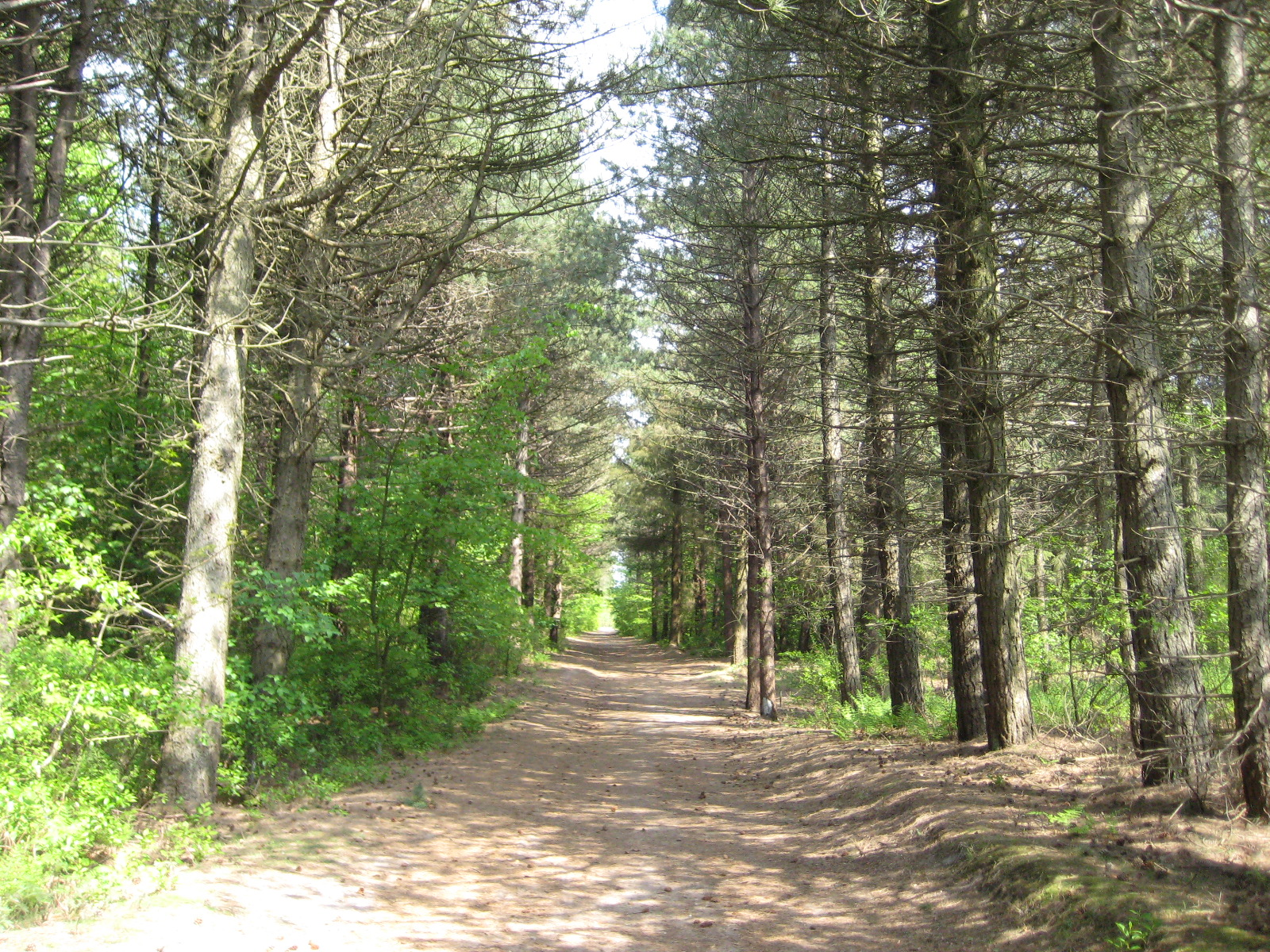 Waldweg auf der Nordseeinsel Amrum. Aufnahme vom Mai 2012.